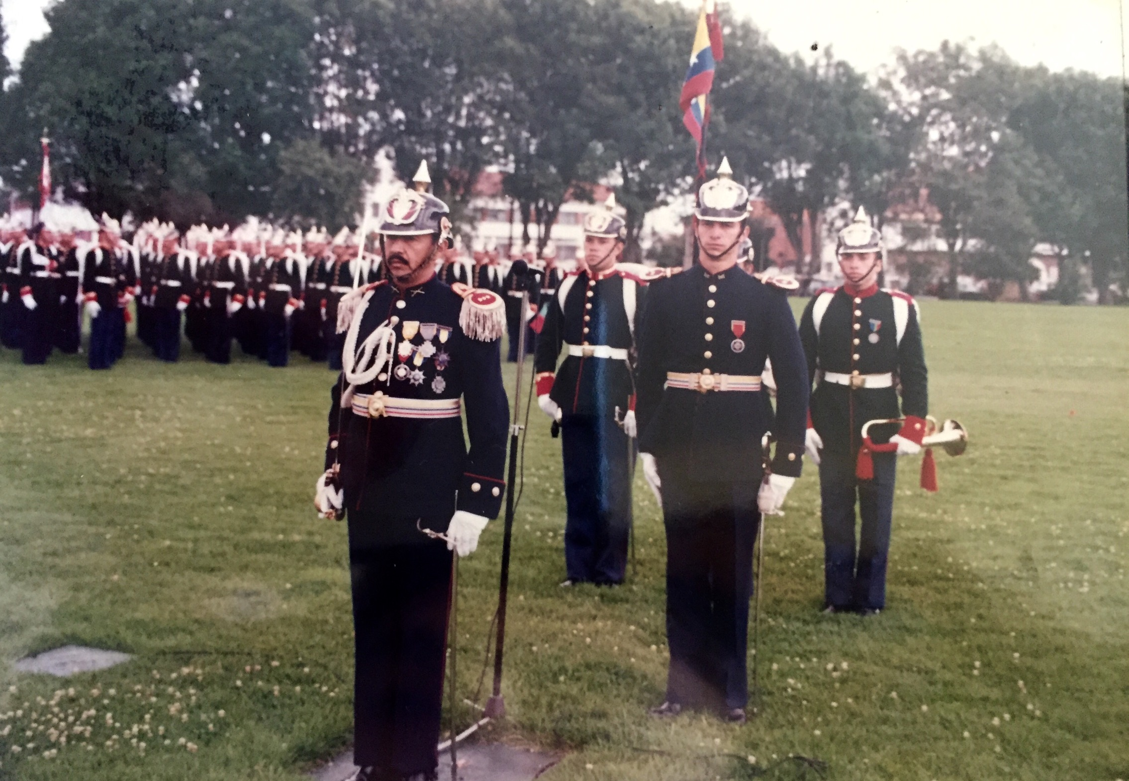 El General Carreño durante una ceremonia militar cuando el era sub-director de la Escuela Militar de Cadetes General Jose Maria Cordova